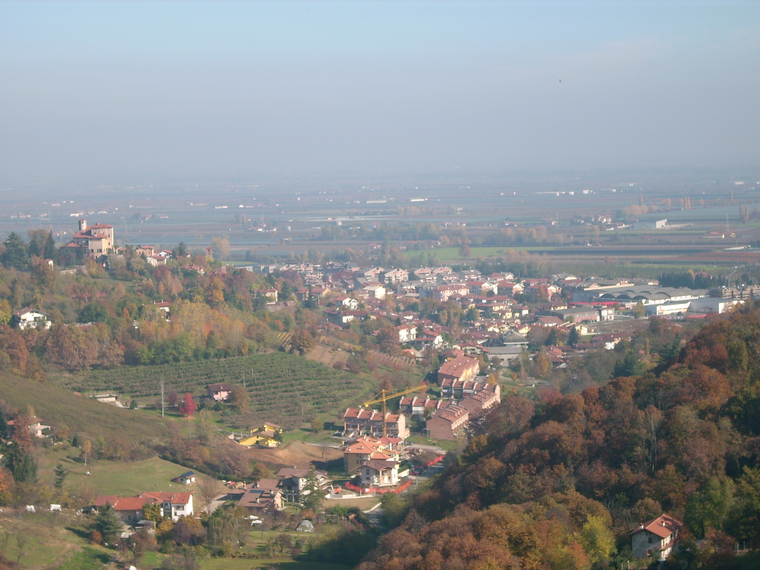 Panorama di Manta, Piemonte, Italia